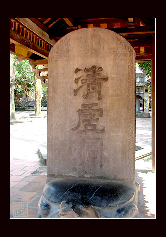 Bia "Thanh Hư động", bút tích của vua Trần Duệ Tông tại chùa Côn Sơn